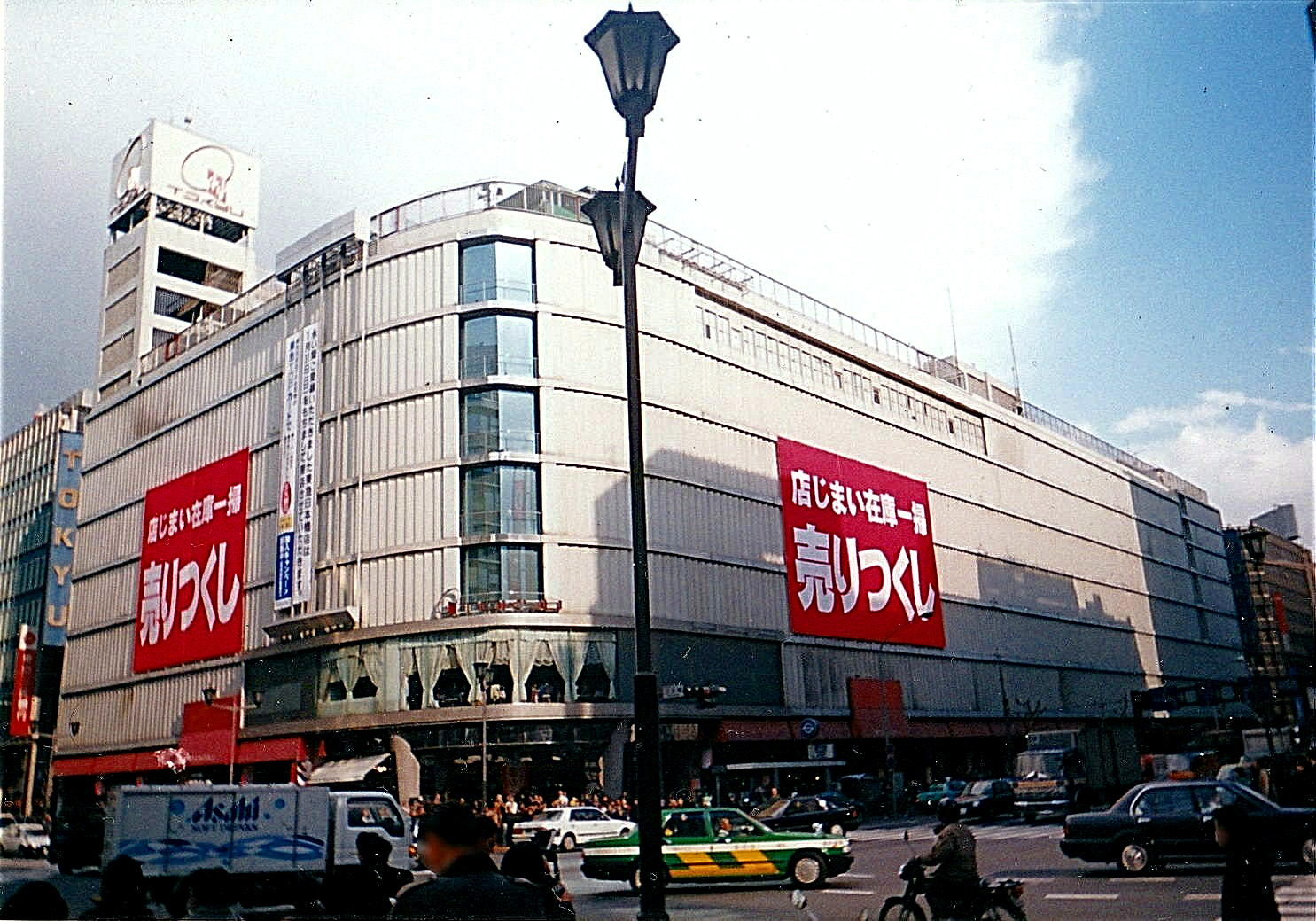 東京都中央区日本橋に所在した東急百貨店日本橋店（旧・白木屋）。1999年1月31日閉店。跡地は現在コレド日本橋となっている。 これは閉店セール当時の建物外観写真。